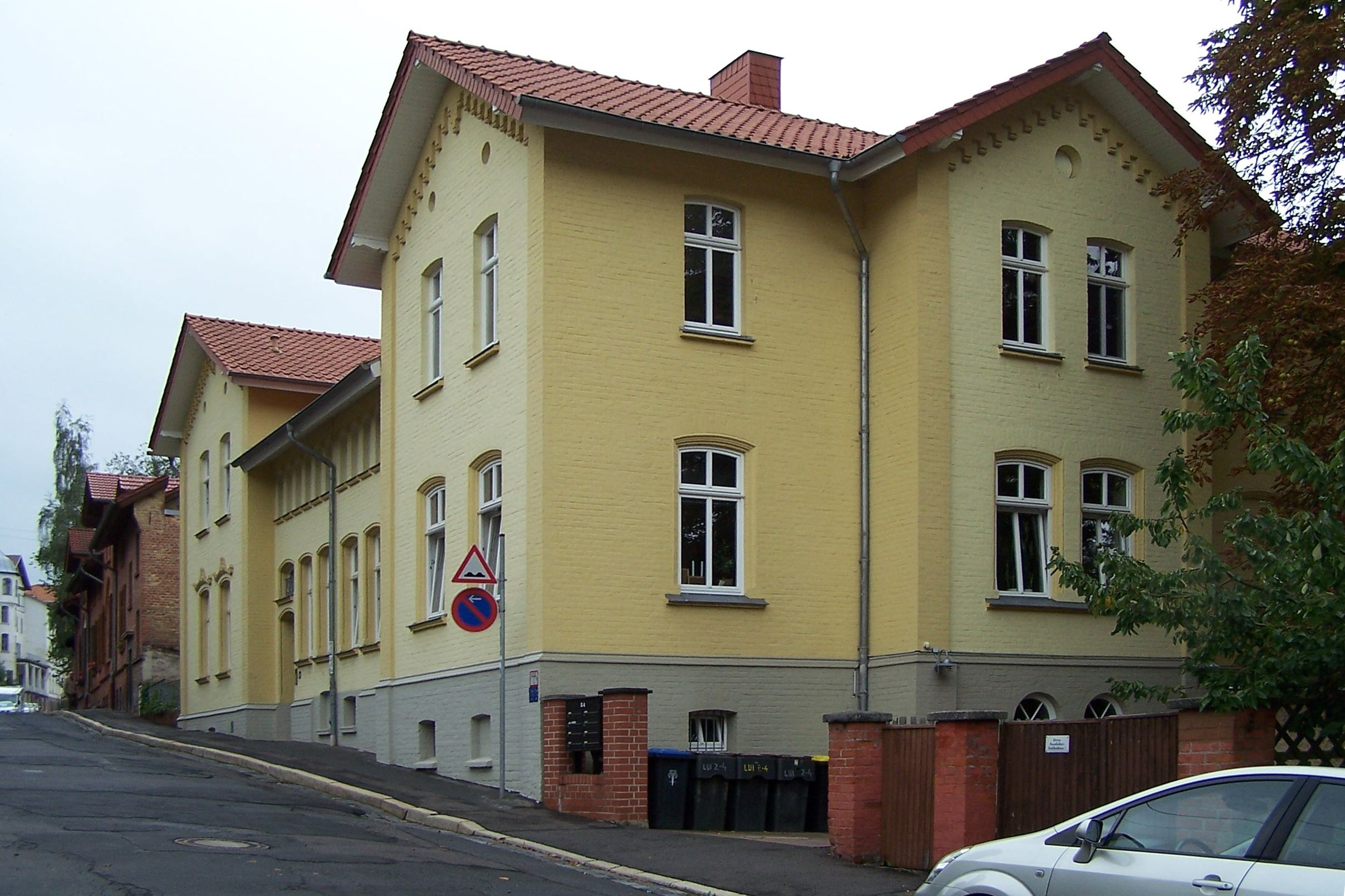 Das Doppelhaus Luisenstraße 2-4 wurde von dem renommierten Eisenacher Architekten Eduard Sältzer für den Kammerherren und Hauptmann Franz August von Stockhausen (Haus Nr. 2), den Geologen, Paläontologen und Unternehmer Johann Georg Bornemann und zum Eigenbedarf im Jahre 1872 entworfen und 1874 fertiggestellt. In diesem Haus wohnte von 1886-1932 der Schwiegersohn des Erbauers, der Geheime Großherzoglich-Sächsische Justizrat Alfred Appelius. Er war der Entwurfsverfasser des im Jahre 1909 nach dem Grundsatz des allgemeinen gleichen im Großherzogtum eingeführten direkten Wahlrechts und der letzte Präsident des Landtages im Großherzogtum Sachsen-Weimar-Eisenach. Bis 1964 wohnte seine Tochter, Martha Erbslöh, geb. Appelius, mit ihrer Familie im Haus.